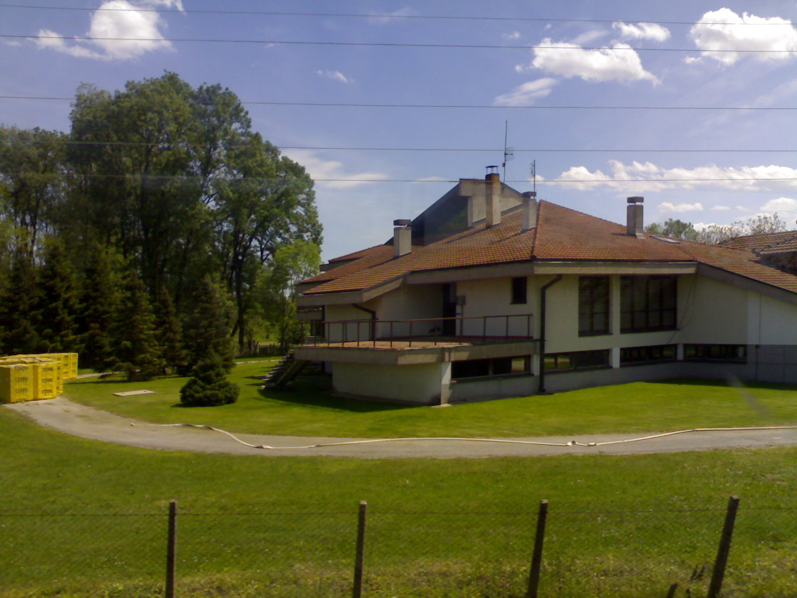 Расадник у Липолисту, Шабац, сликано 6. 5. 2012.